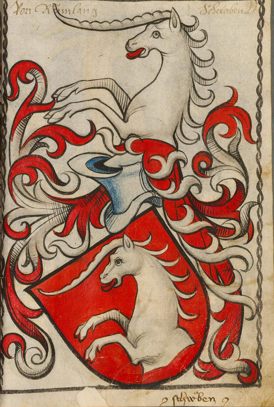 Scheibler'sches Wappenbuch, älterer Teil; Seite 99 Von Rumlang Schwaben